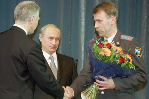 МОСКВА, ГОСУДАРСТВЕННЫЙ КРЕМЛЕВСКИЙ ДВОРЕЦ. Торжественное собрание, посвященное Дню милиции. Вручение лучшим сотрудникам МВД государственных наград. Орден Мужества вручен прапорщику милиции Юрию Зимину (справа).